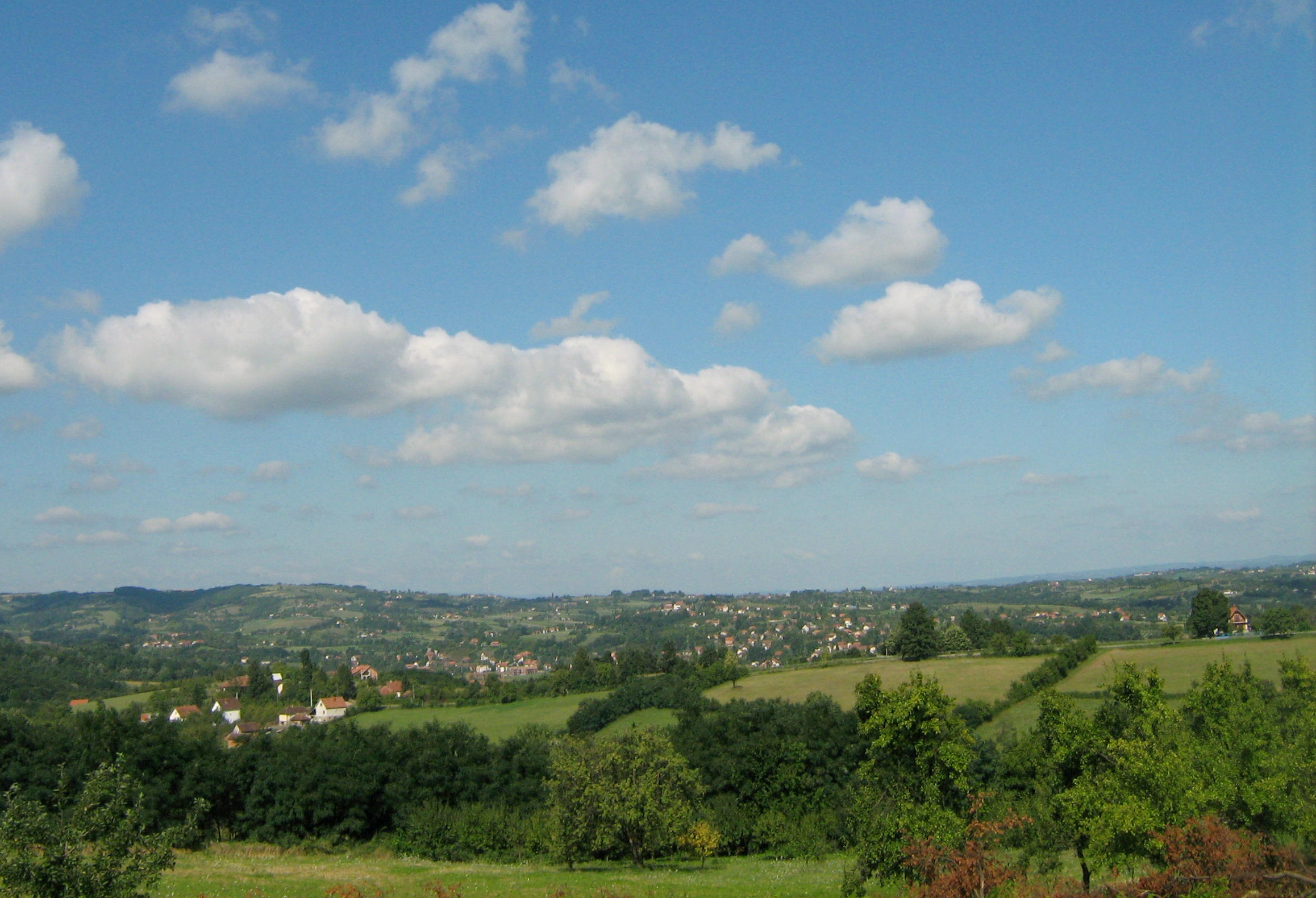 Поглед на Бању Врујце, 2008. година